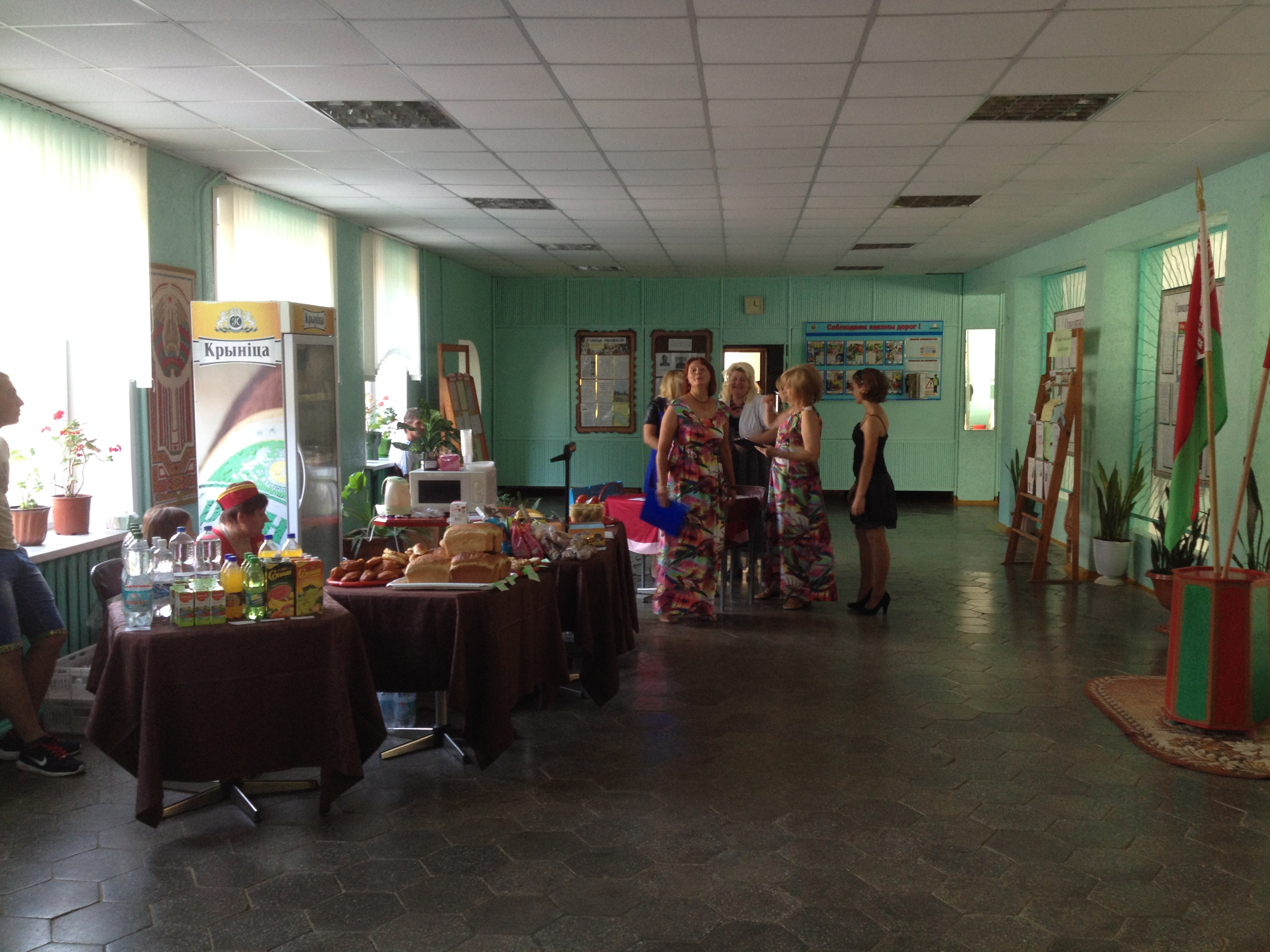 Wybory parlamentarne na Białorusi, 2017